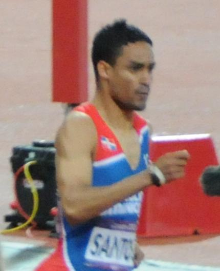 Luguelín Santos Aquino en finale du 400m des JO de Londres 2012